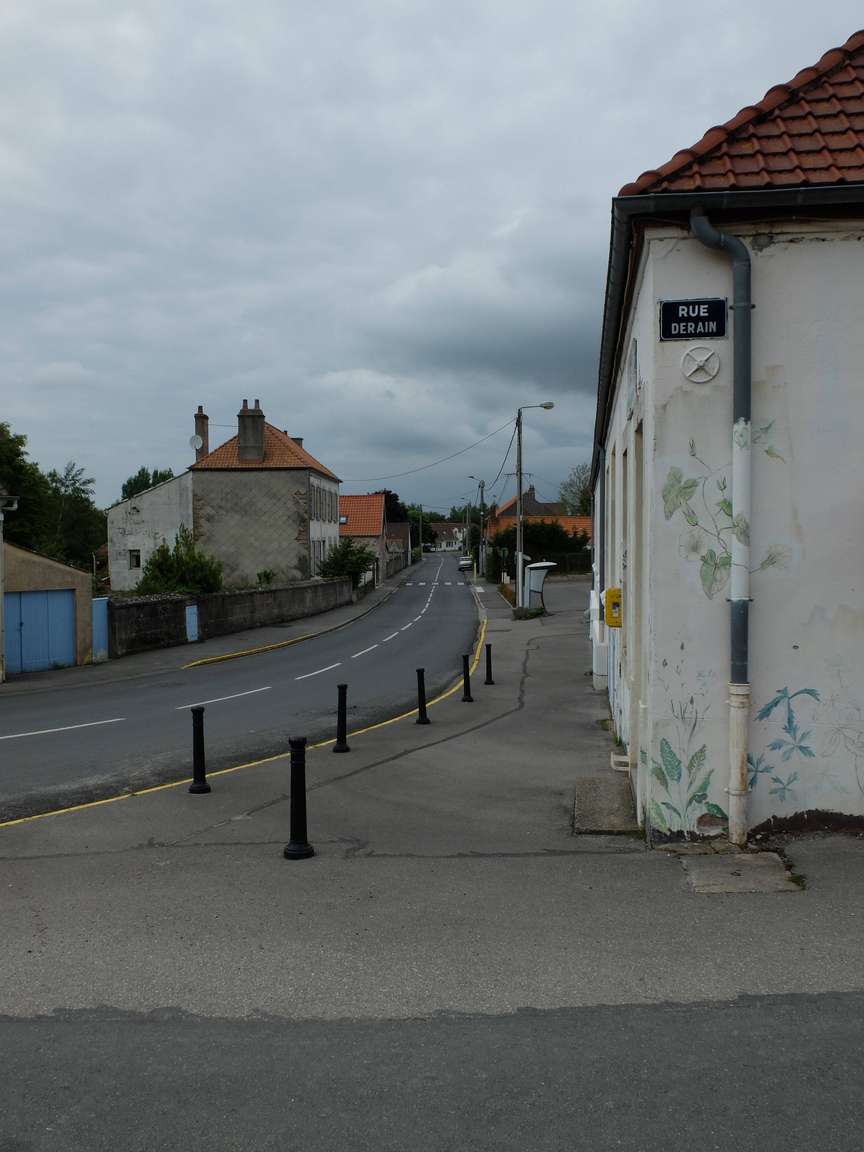 Intersection des rues de la mairie et Derain de Nesles.